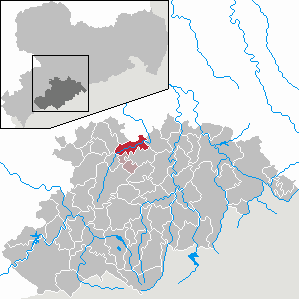 Burkhardtsdorf im Erzgebirgskreis, Sachsen